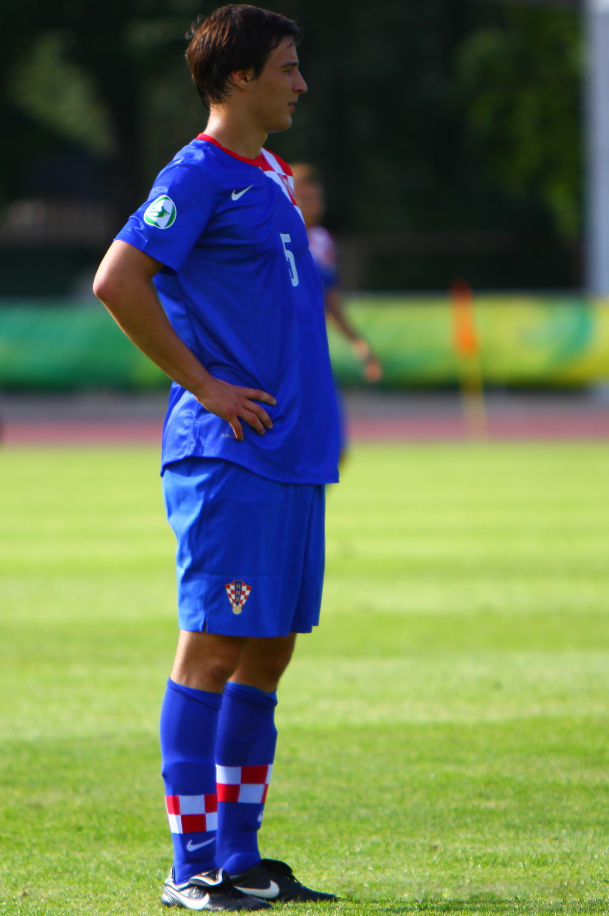 Matej Mitrović